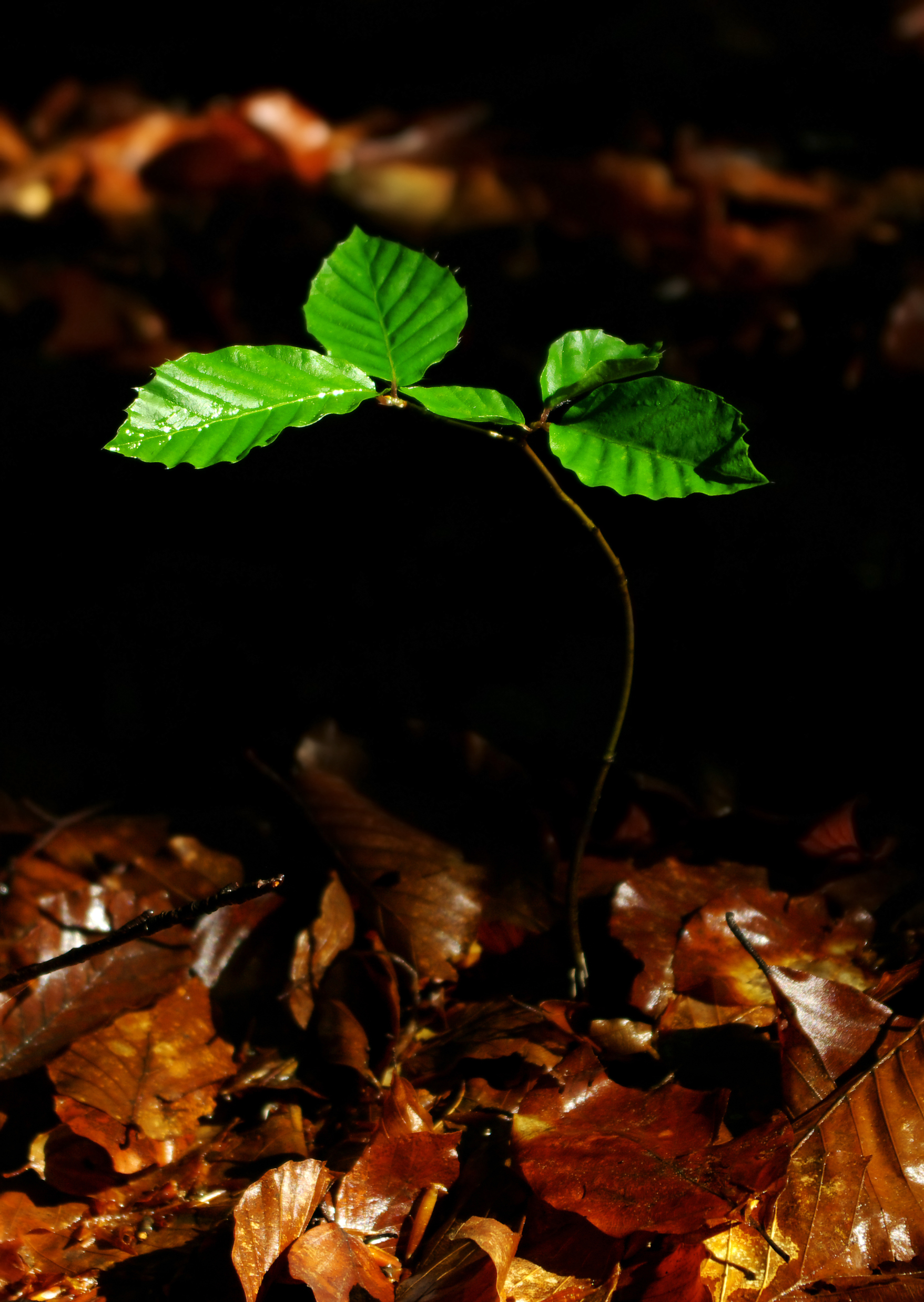 Buk pospolity, buk zwyczajny (Fagus sylvatica) - młoda roślina